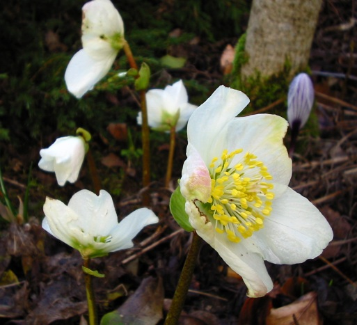 Rose de Noel, Dieppe. This is possibly Helleborus niger. Seysi.